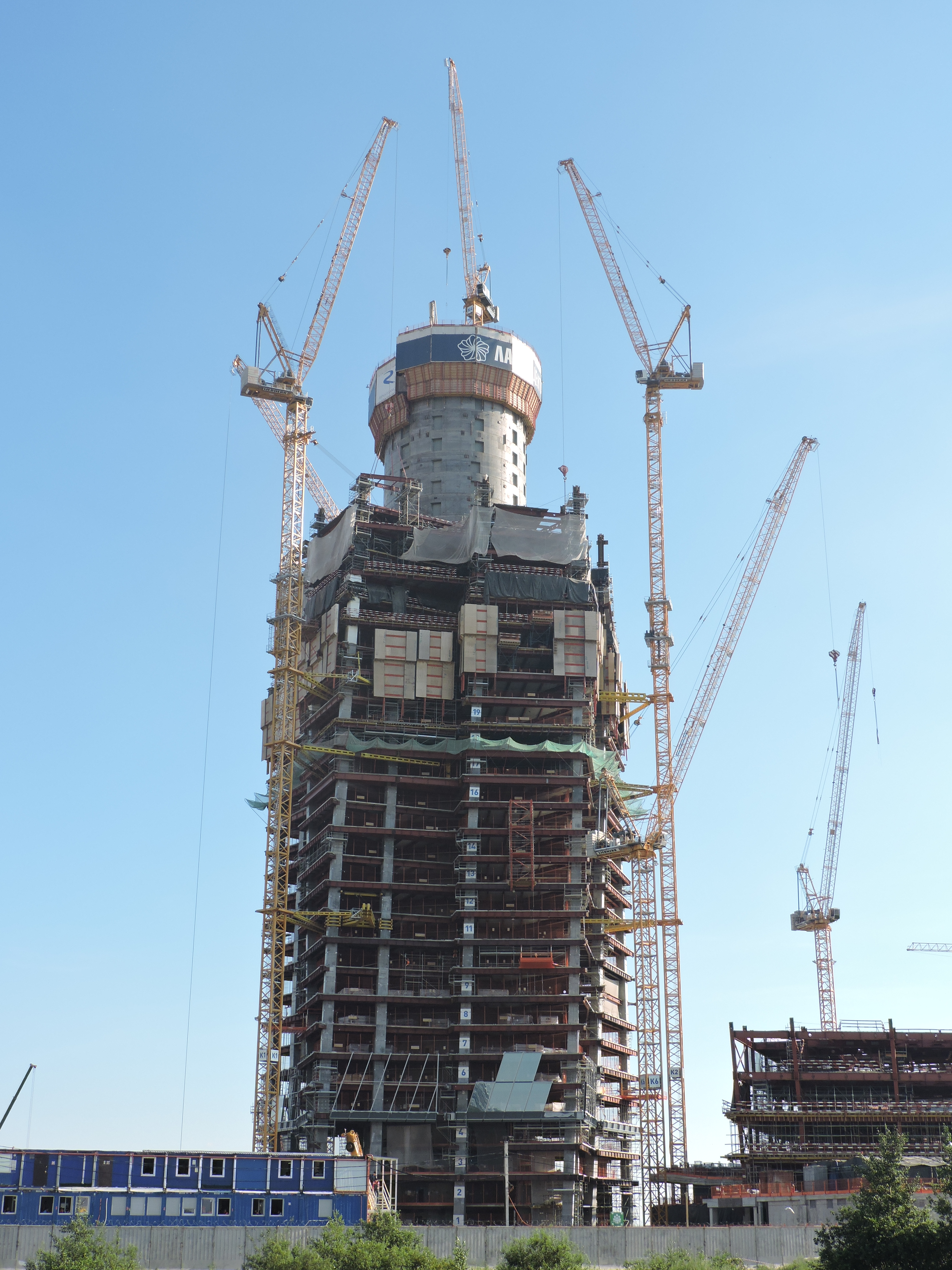 Лахта-центр (2 июля 2016). Башня достигла 147 метров высоты, став самым высоким зданием Петербурга